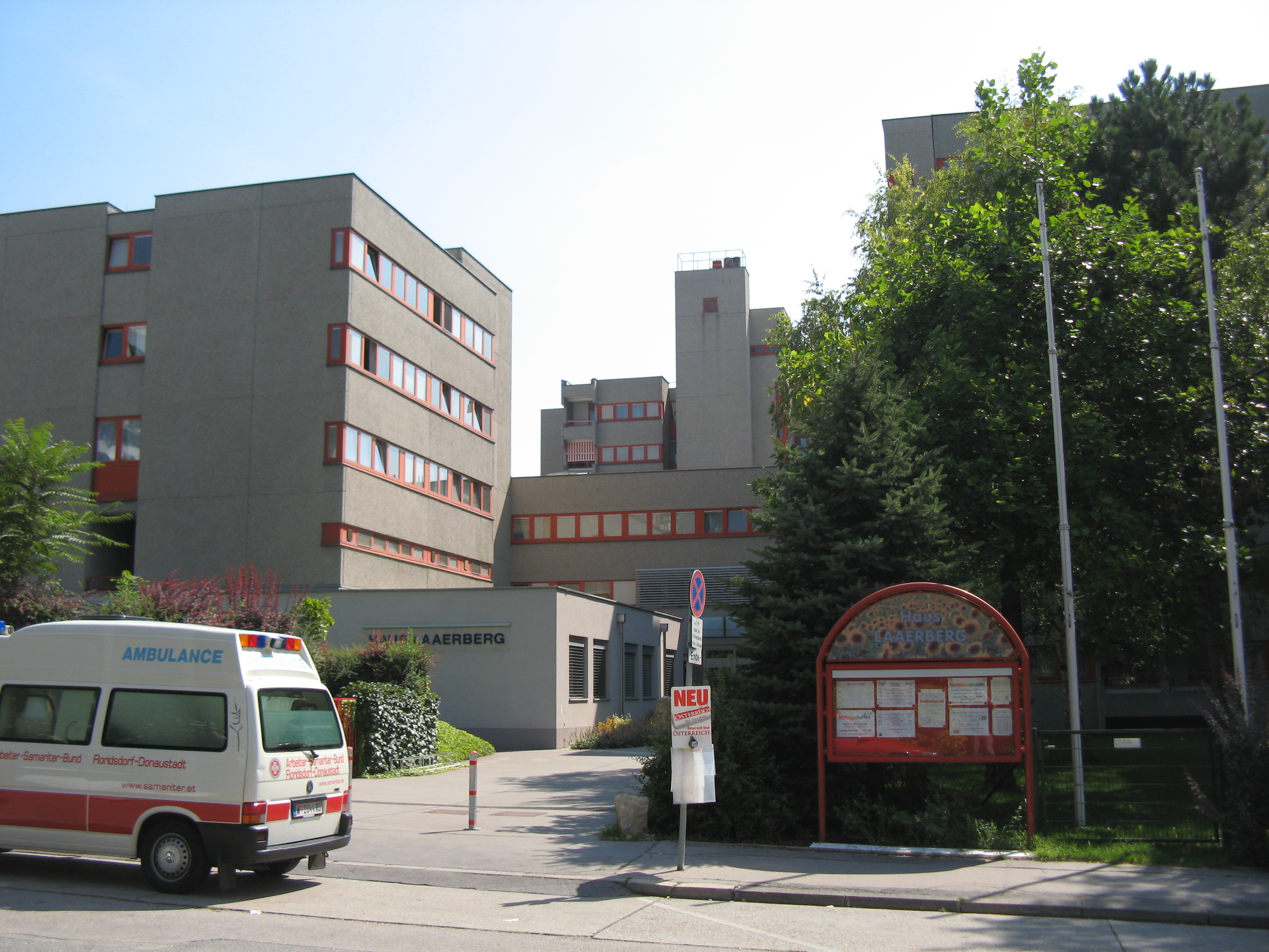 Pensionistenheim Laaer Berg (1968-72) von Rupert Falkner, Ada-Christen-Gasse 3, Wien-Favoriten